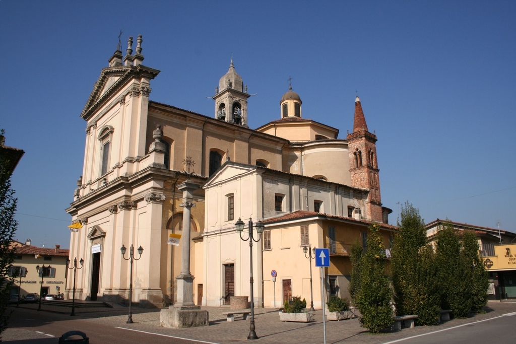 Autore Giorces. Brignano Gera d'Adda, la Parrocchiale.